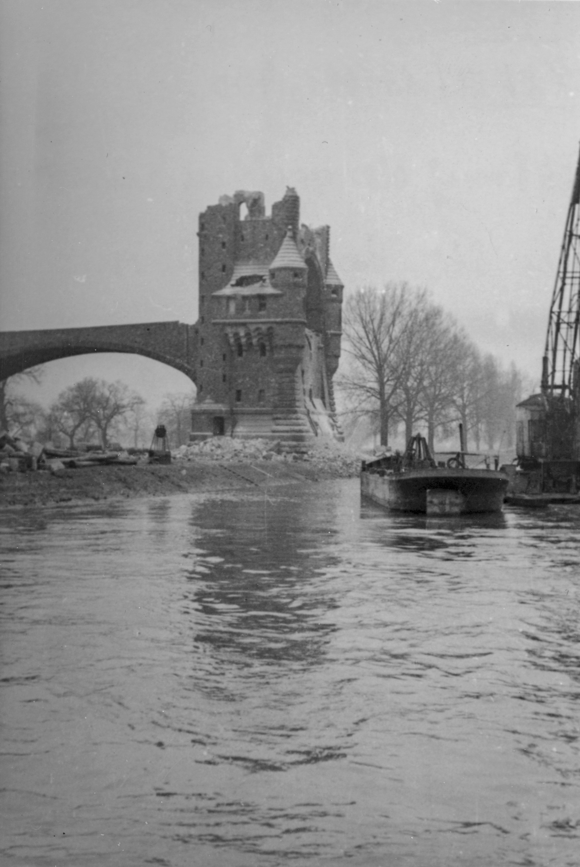 Die 1900 eingeweihte "Ernst-Ludwig-Brücke" wurde im März 1945 von der Wehrmacht gesprengt. Im Herbst 1950 wurde mit den Vorarbeiten zu einem Neubau begonnen. Bild: Abbruch des stark beschädigten Turms der Straßenbrücke Worms oberhalb der Fahrbahndecke. Der 3 Stockwerk hohe Sockel darunter blieb erhalten. (original Bildunterschrift der Quelle)